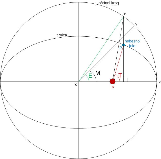 Srednja, ekscentična in prava anomalija.